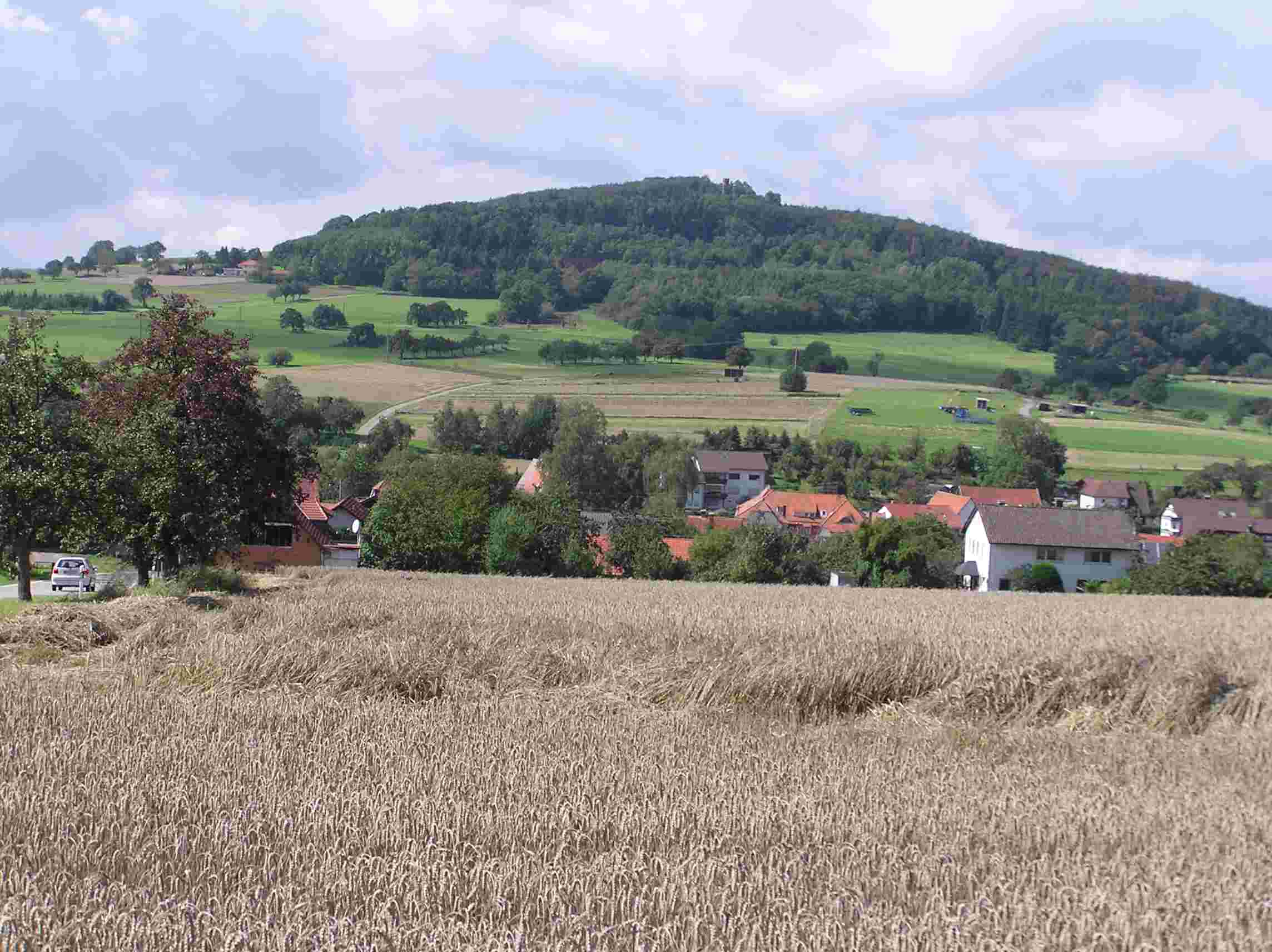 Blick auf den Katzenbuckel